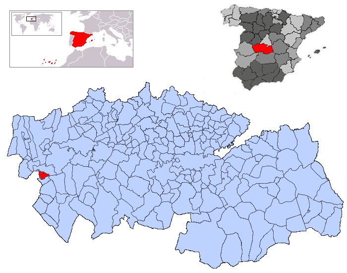 Azután en la provincia de Toledo